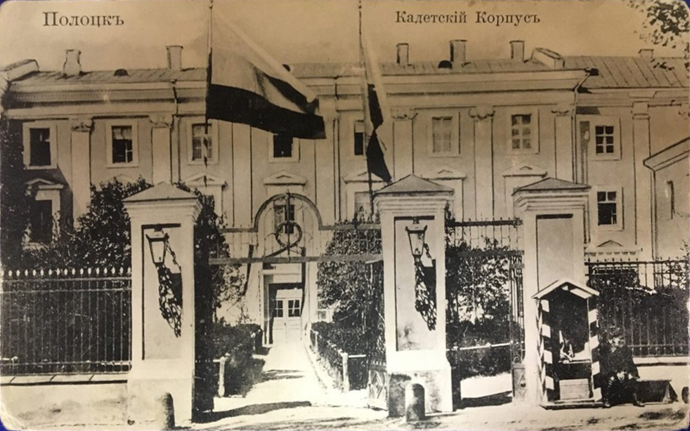 Беларуская (тарашкевіца): Полацак (Połacak), пляц Рынак (plac Rynak) У бок вуліцы Вялікай (vulica Vialikaja). Калегіюм езуітаў